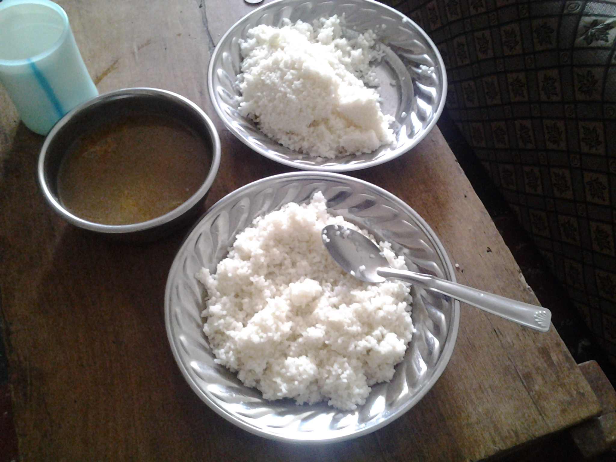 Riz à la sauce claire servi dans un restaurant africain dit maquis d'Abidjan This is an image of food from Ivory Coast